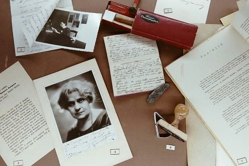 Presso la biblioteca civica di Schio è presente la collezione Romana Rompato: oggetti personali, autografi, libri e minute.